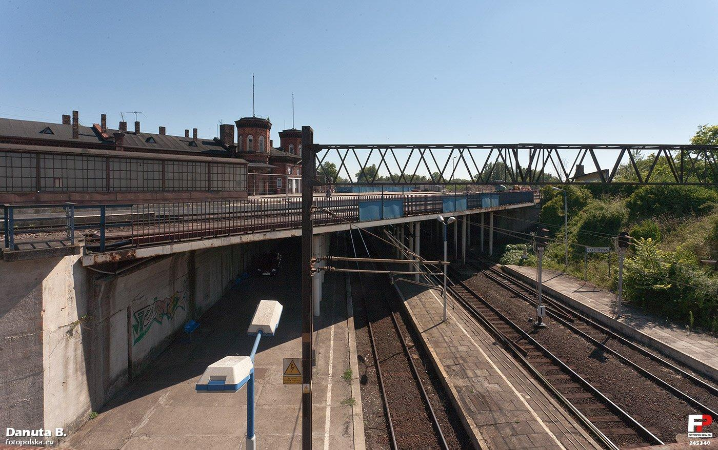 Opis czeka na Festunga, zrobi to lepiej:).